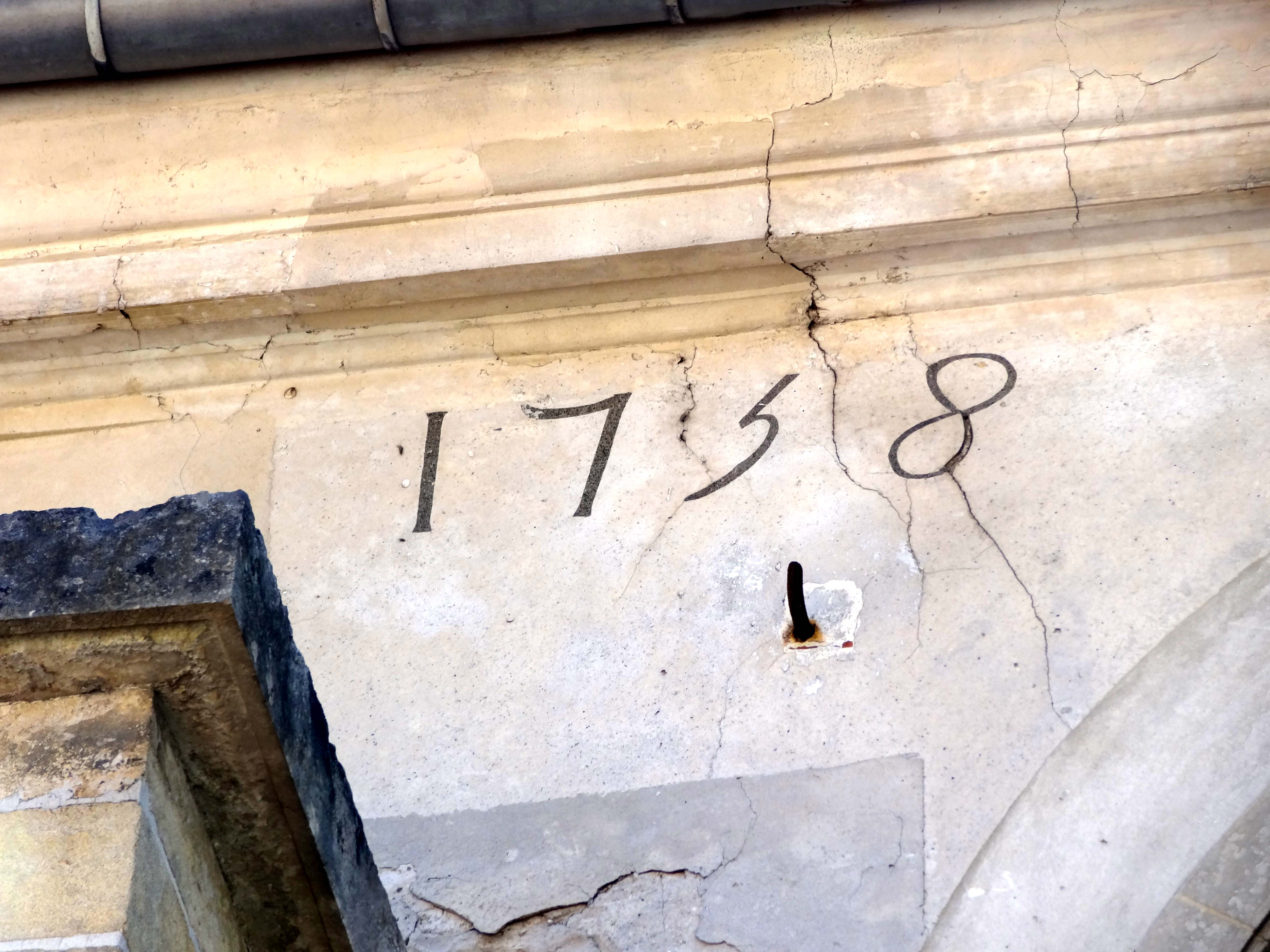 Église Notre-Dame-de-l'Assomption d'Évecquemont - voir titre.